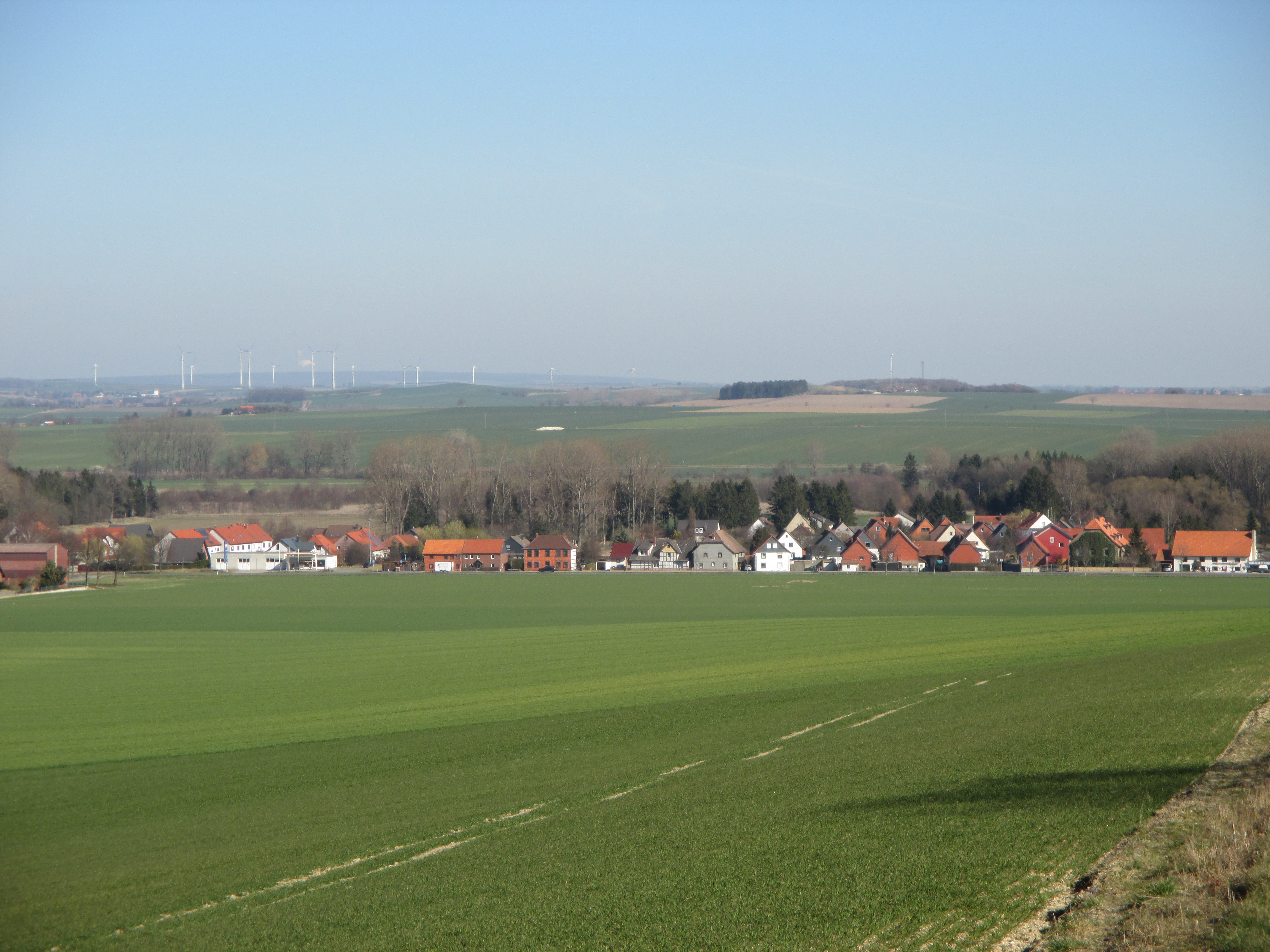 Blick vom Ostrand des Oderwalds auf Heiningen, Landkreis Wolfenbüttel